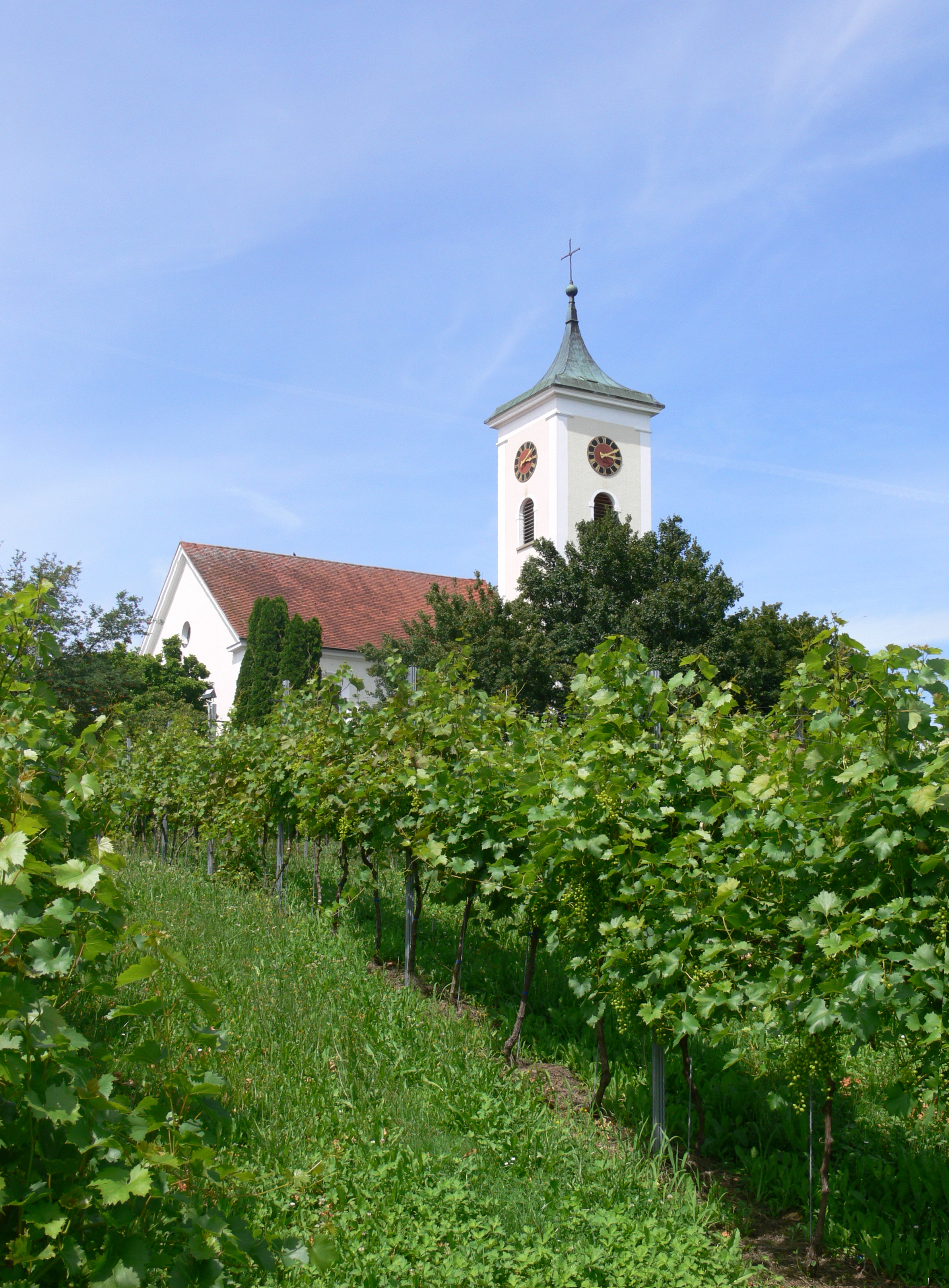 Friedrichshafen, Stadtteil Berg, Pfarrkirche St. Nikolaus